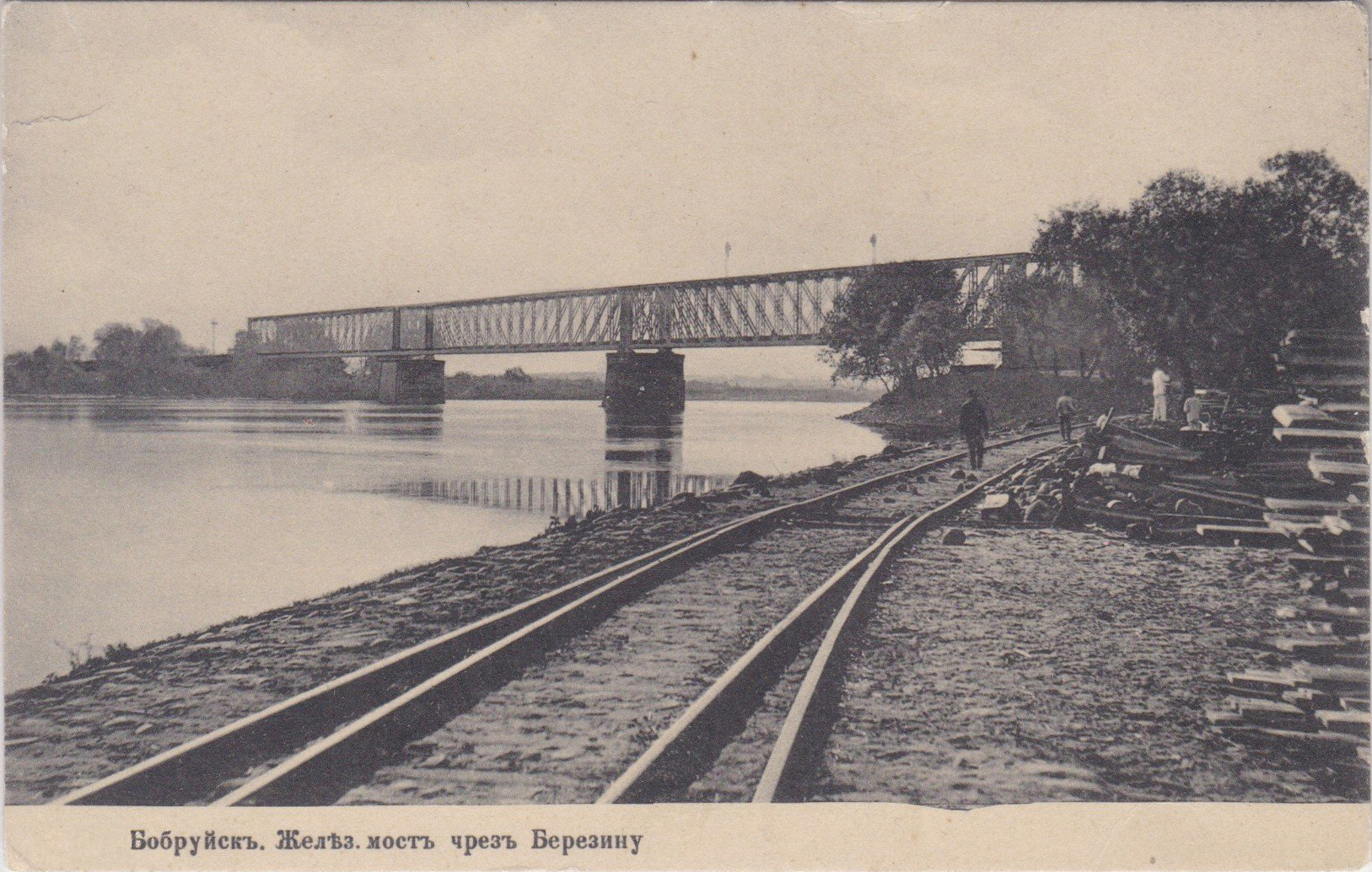 Беларуская (тарашкевіца): Бабруйск (Babrujsk), рака Бярэзіна (Biarezina). Чыгуначны мост